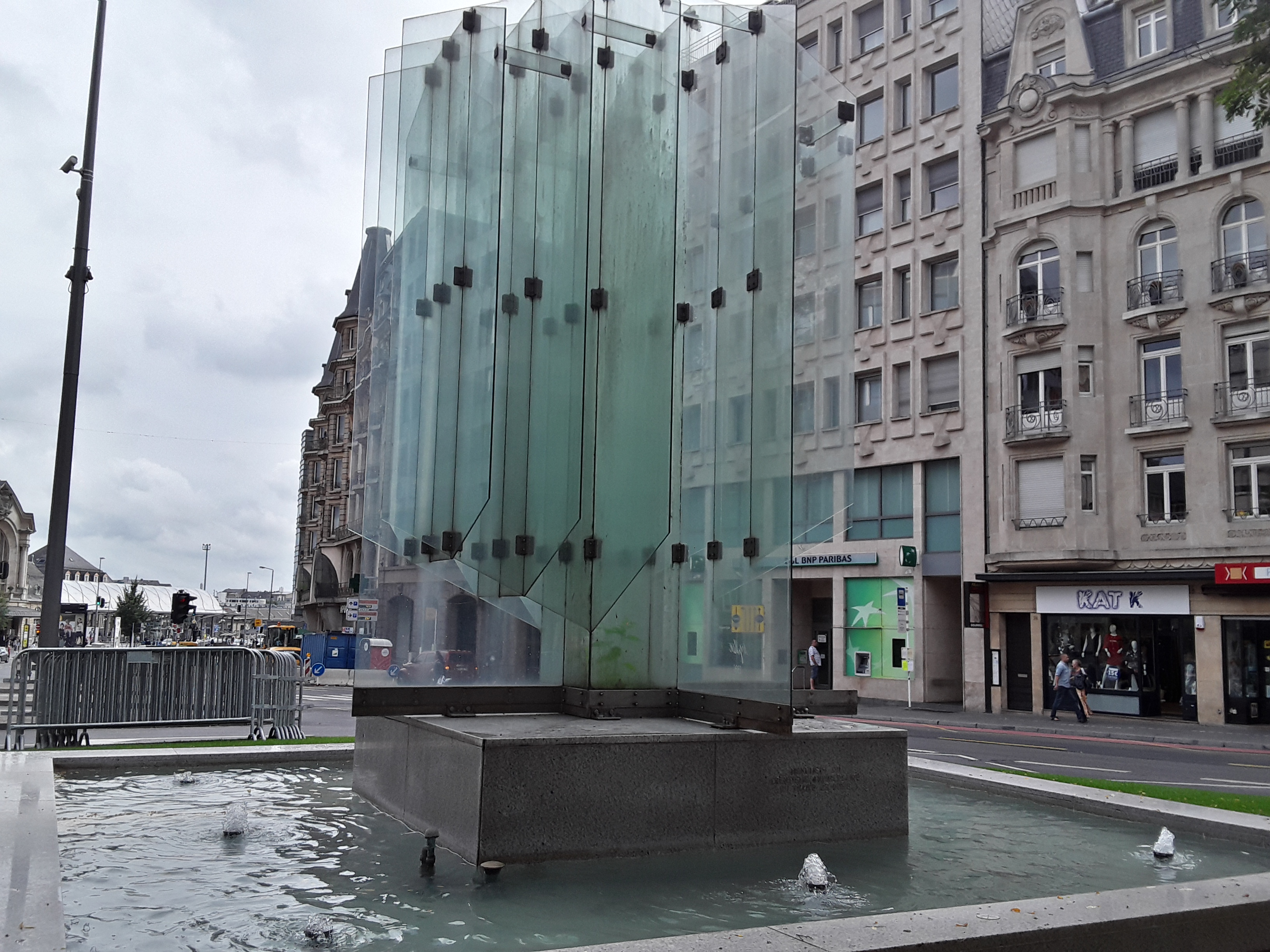 Fontaine pour la commémoration du 30e anniversaire de la signature du Traité de Rome de 1957. Luxembourg, coin avenue de la Gare, avenue de la Liberté. Matière: verre. Hauteur: 4m